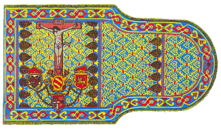 Estandarte de la Liga Santa utilizado en la batalla de Lepanto (1571)